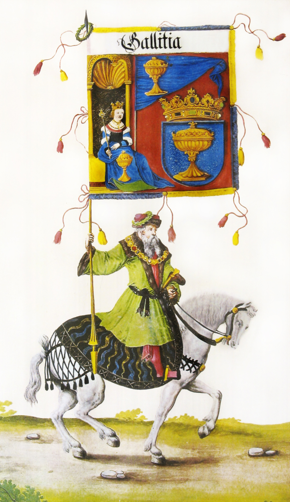 Ilustración da obra "Carro triunfal de Maximiliano", creada en 1515 por Albrecht Durer, na que se aprecia un xinete ou portaestandarte que leva a bandeira do reino de Galicia.